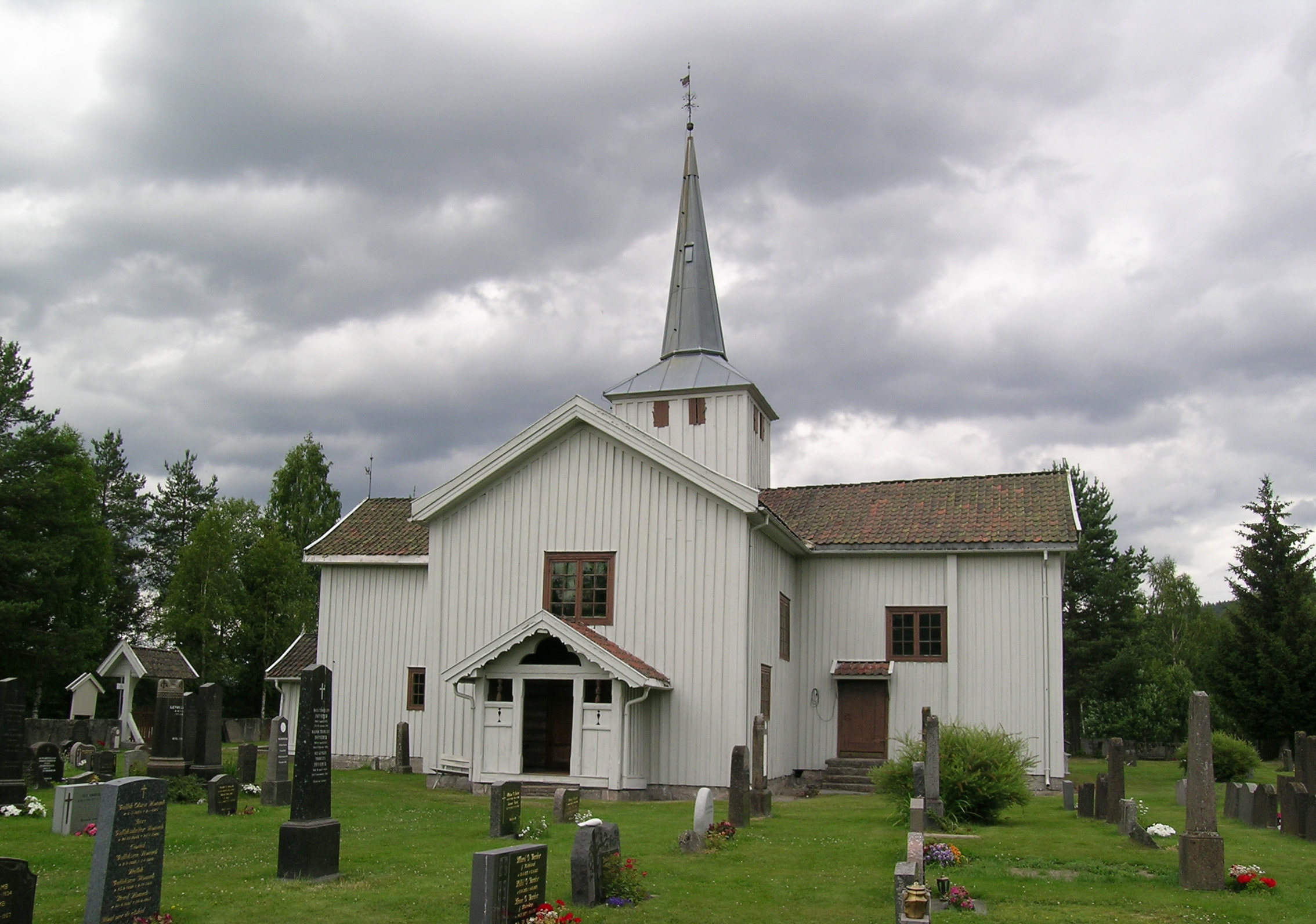 Svene church, Flesberg, Buskerud, Norway